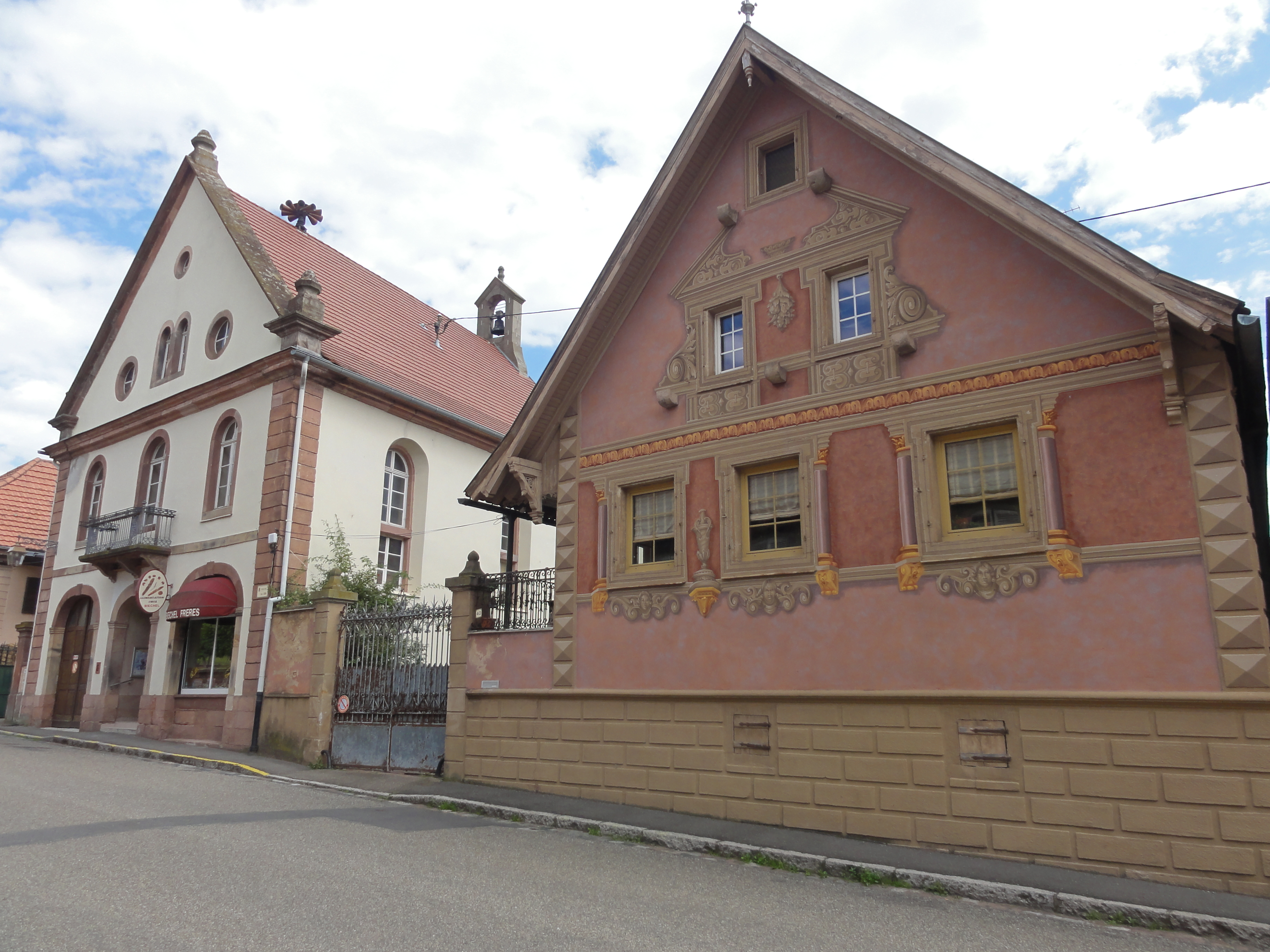 Alsace, Bas-Rhin, Nothalten, Ancienne église Saint-Michel (XVIIIe) transformée en mairie (XIXe). .